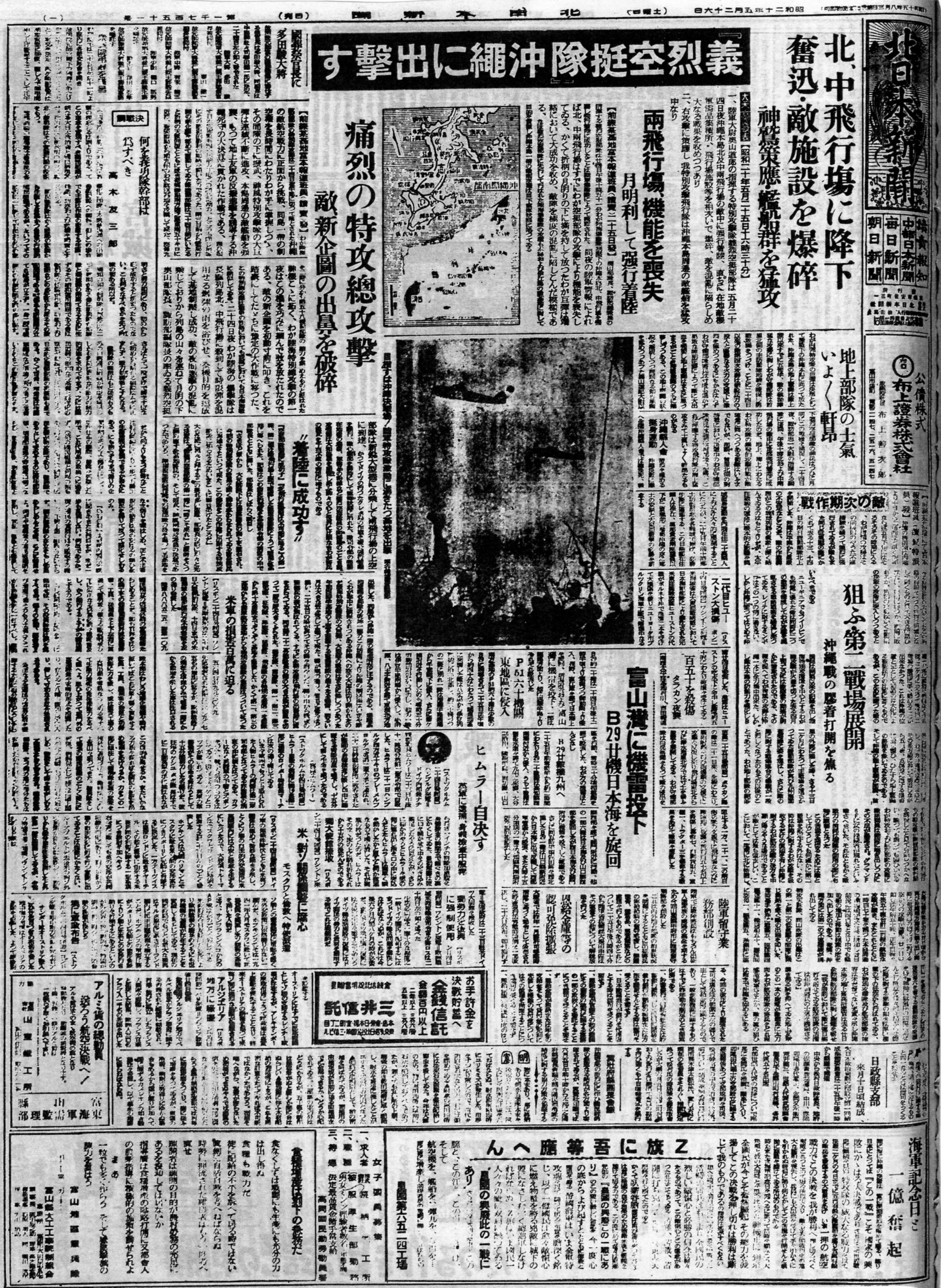 富山湾に機雷投下